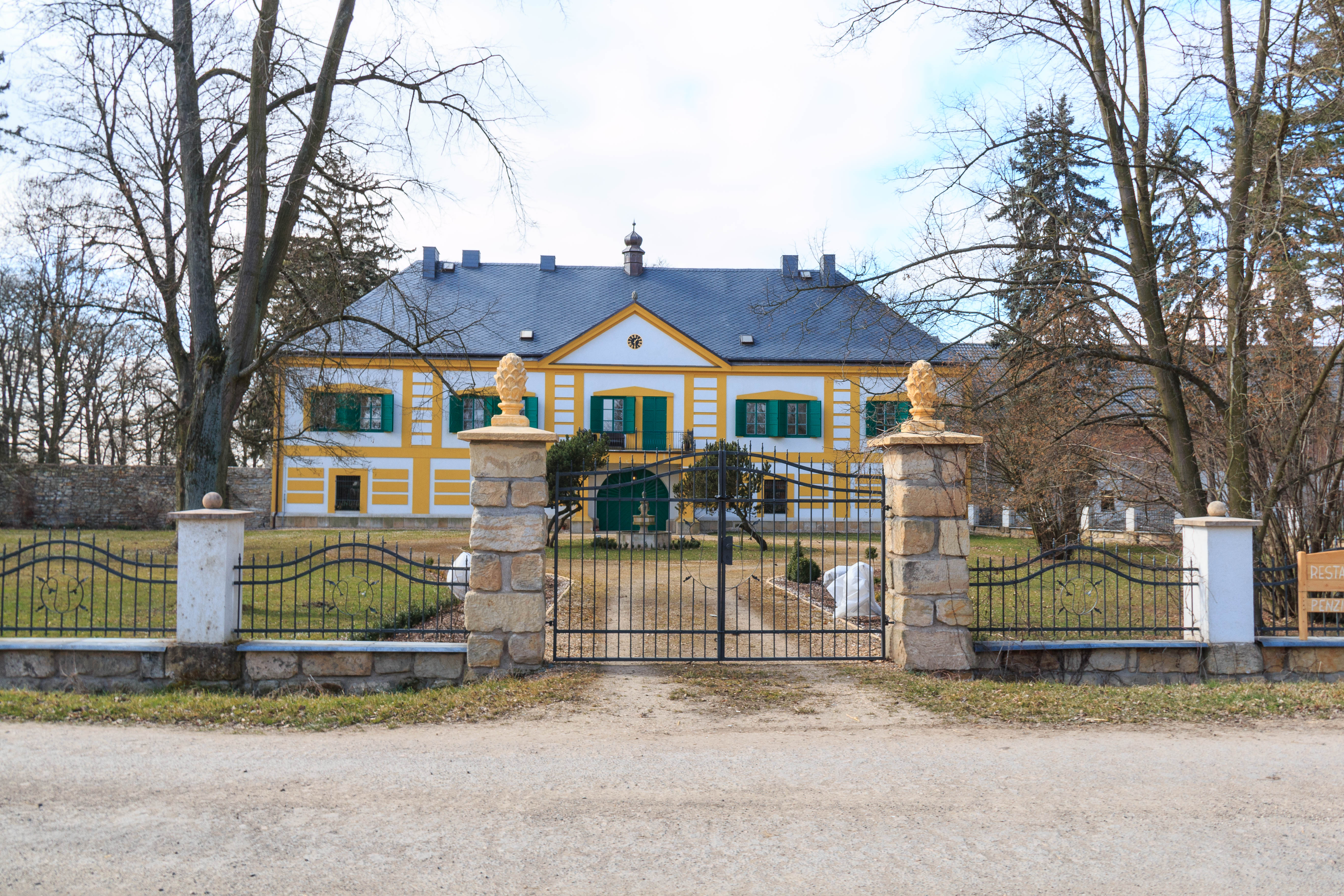 Jakubův Nový Dvůr